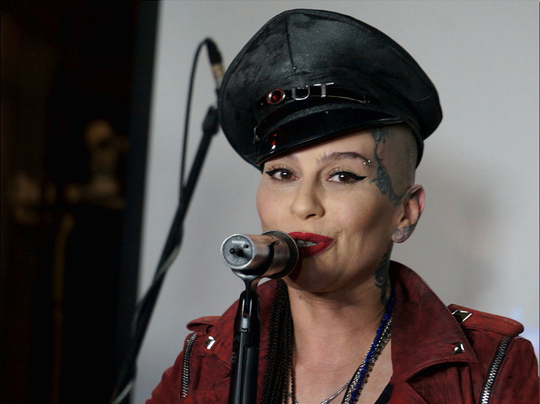 Наргиз Закирова, концерт в Самаре